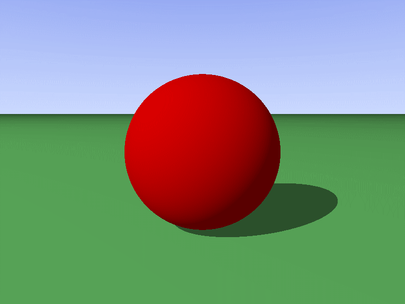 Einfache Szene in POV-Ray mit einer roten Kugel mit dem Radius r=0,5.